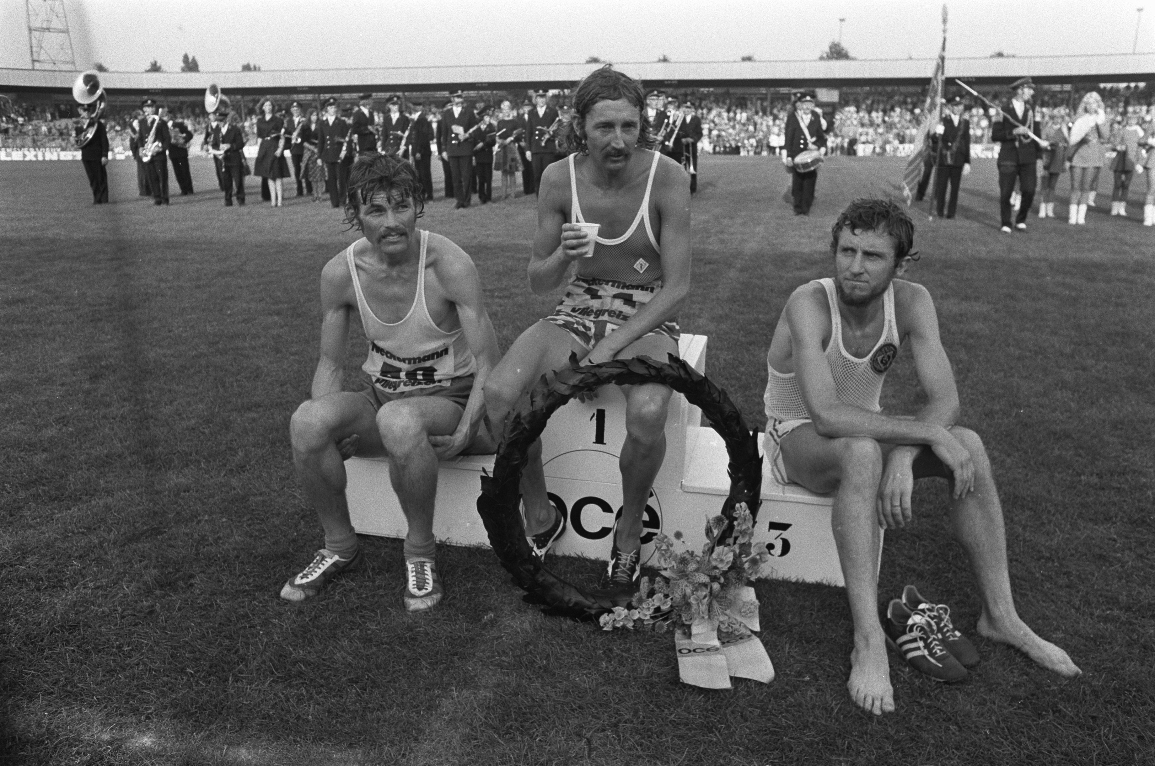 Collectie / Archief : Fotocollectie Anefo Reportage / Serie : De Marathon van Enschede 1975 Beschrijving : De nrs. 1, 2 en 3 uitgeput zittend op het erepodium. Alexander Keith, Ron Hill en Brenton Norman. Datum : 31 augustus 1975 Locatie : Enschede, Overijssel Trefwoorden : hardlopen, huldigingen\\stadions, marathon Fotograaf : Fotograaf Onbekend / Anefo Auteursrechthebbende : Nationaal Archief Materiaalsoort : Negatief (zwart/wit) Nummer archiefinventaris : bekijk toegang 2.24.01.05 Bestanddeelnummer : 928-1302